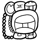 Majų glifas, simbolizuojantis miestą Tonina. Padarytas naudojant freeware Maya font.